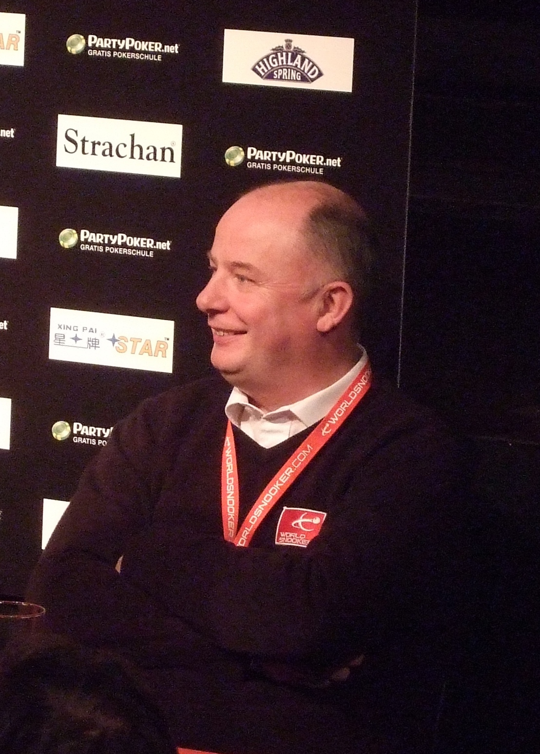 WPBSA Turnierdirektor Mike Ganley